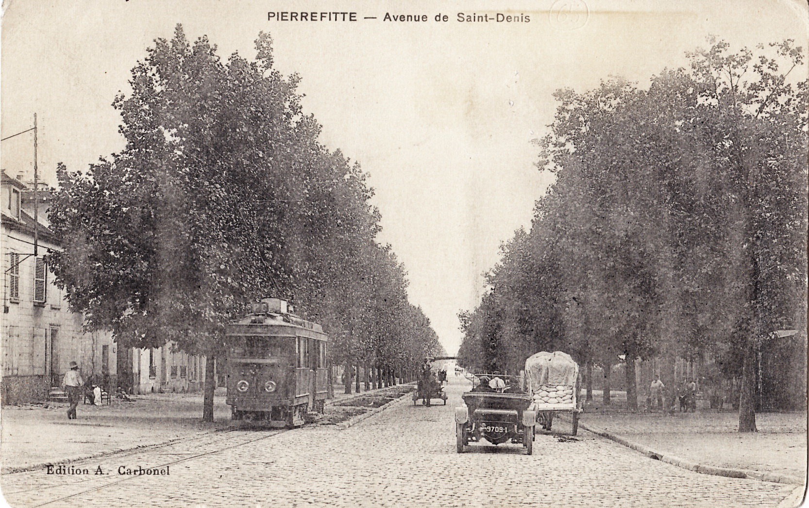 Carte postale ancienne éditée par A. Carbonnel :PIERREFITTE - Avenue de Saint-Denis